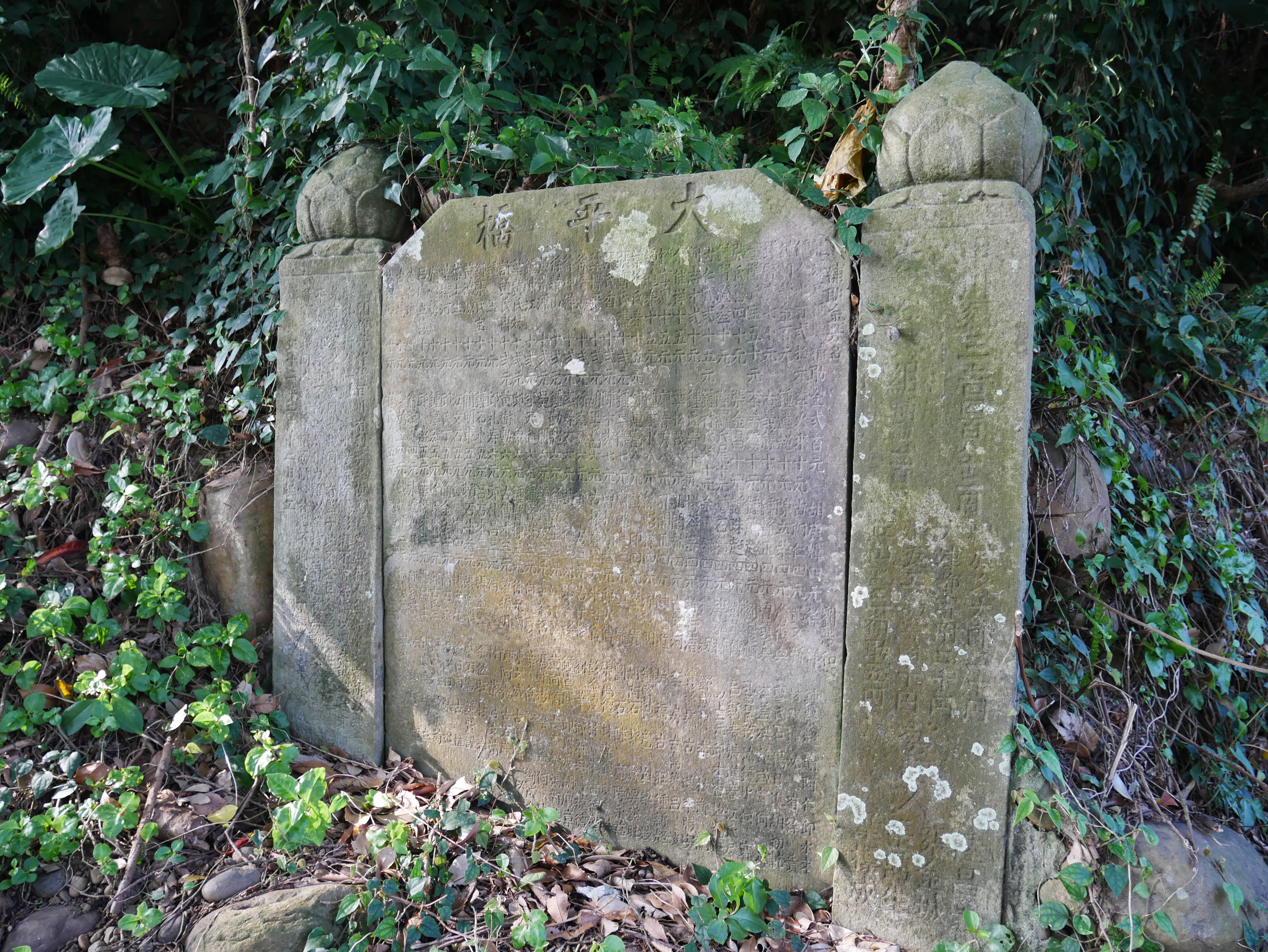 中文（台灣）: 大平橋碑，桃園市龍潭區大平里